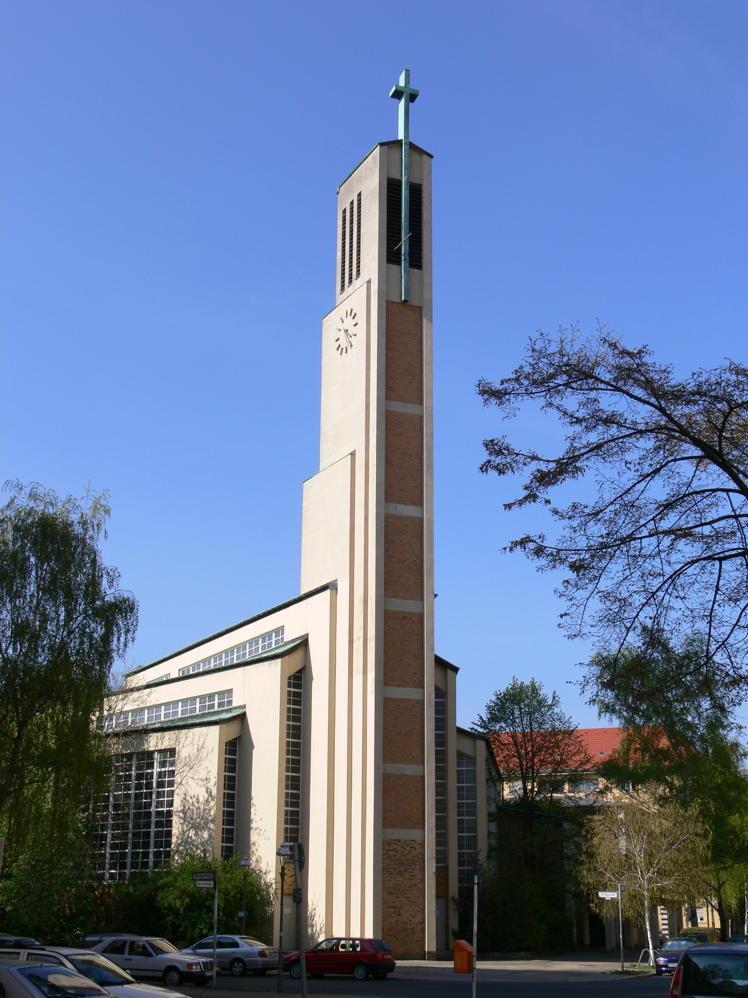 Berlin-Charlottenburg, Evangelische Gustav-Adolf-Kirche (Brahestraße)